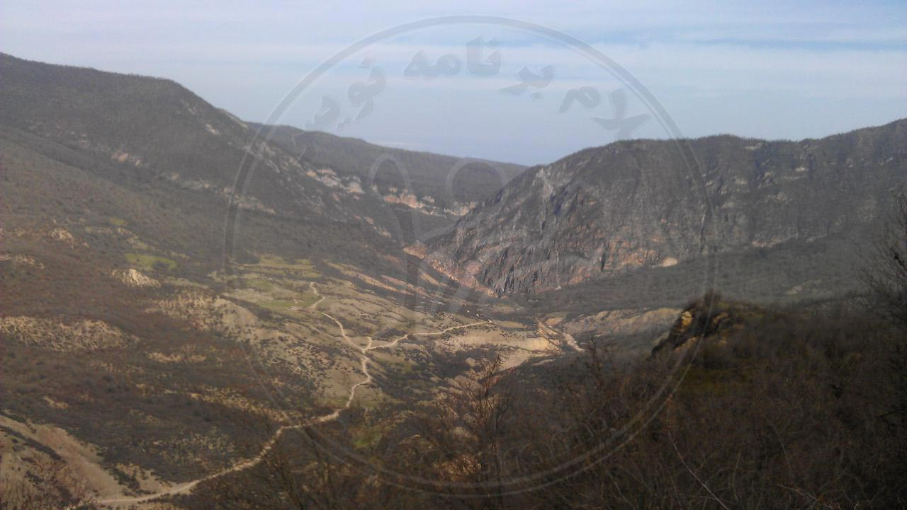 تصویر روستای کدیر-بهزاد گروسیان